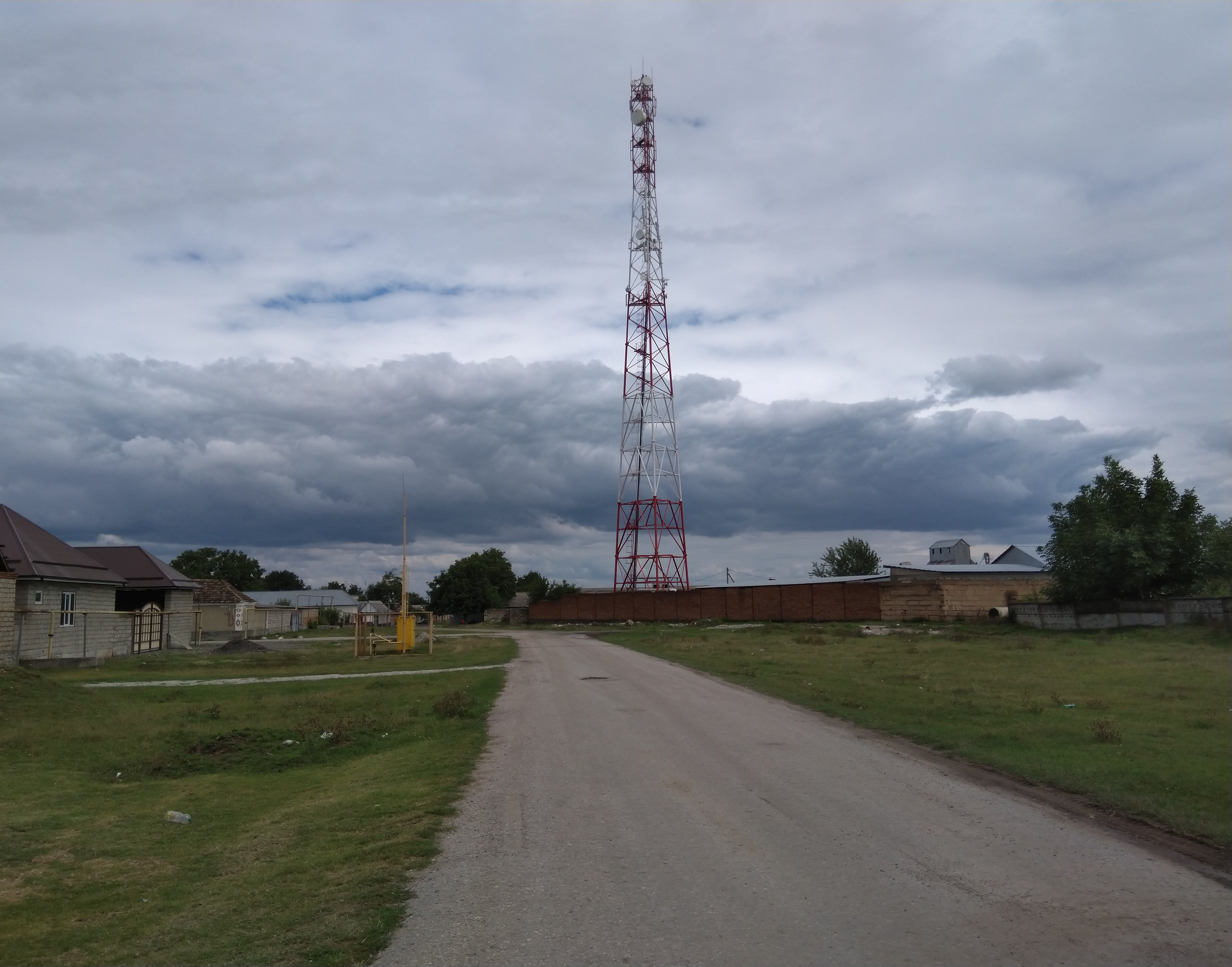 Микрорайон Баз в Старом Череке